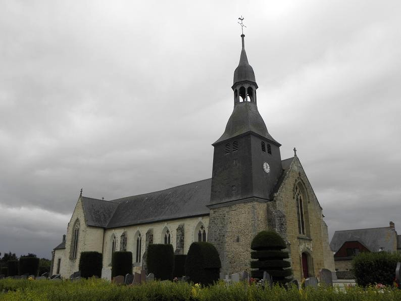 Vue septentrionale de l'église Saint-Médard de Torcé (35).